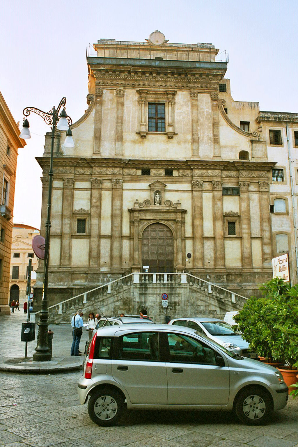 Santa Caterina, Palermo Facade on Piazza Bellini